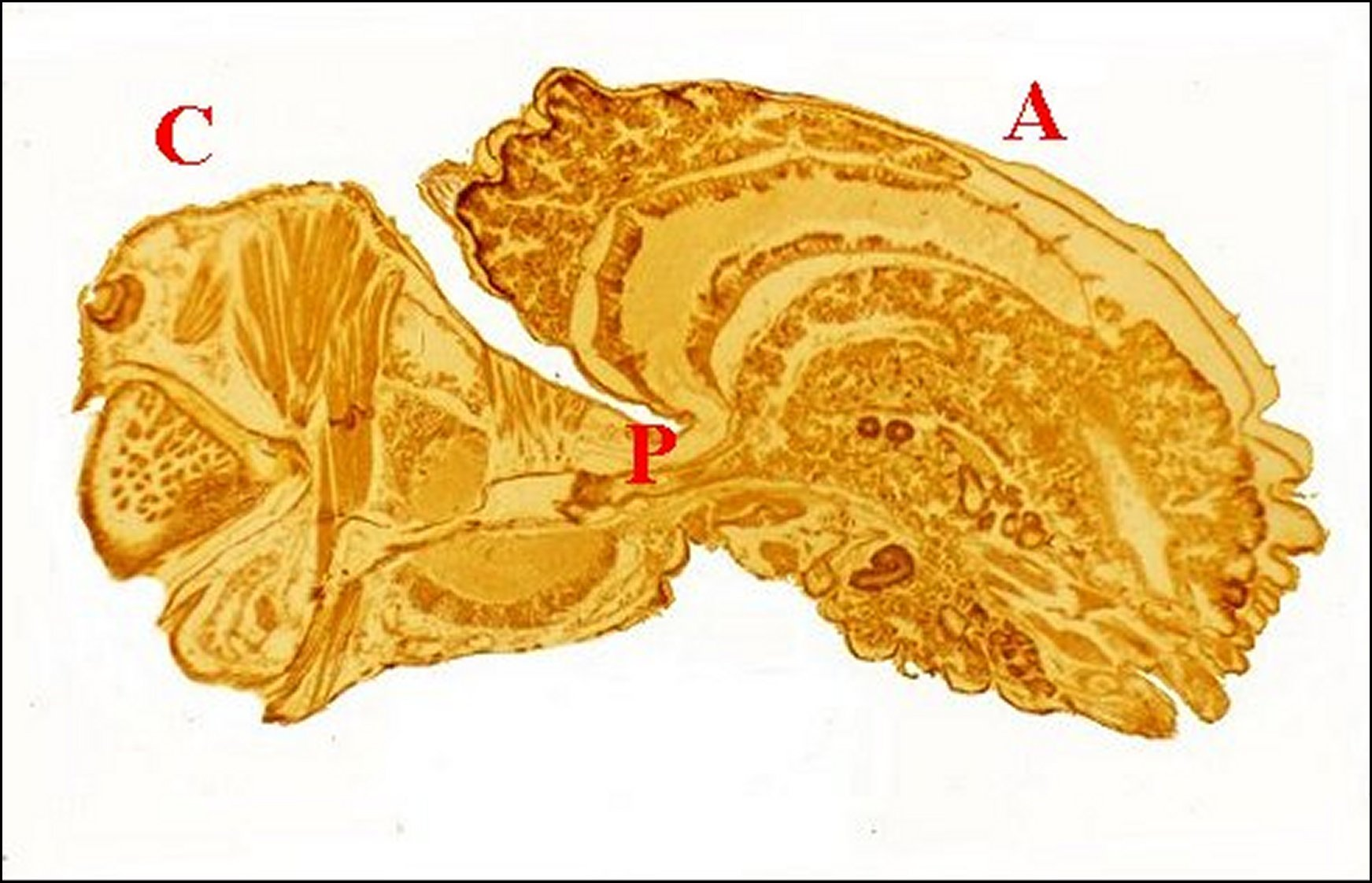 Corps d'une Araignée en coupe histologique sagittale complète